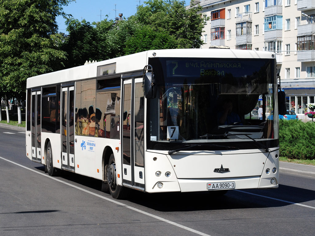 Автобус в Гомеле. Маршрут № 7. МАЗ-203.067